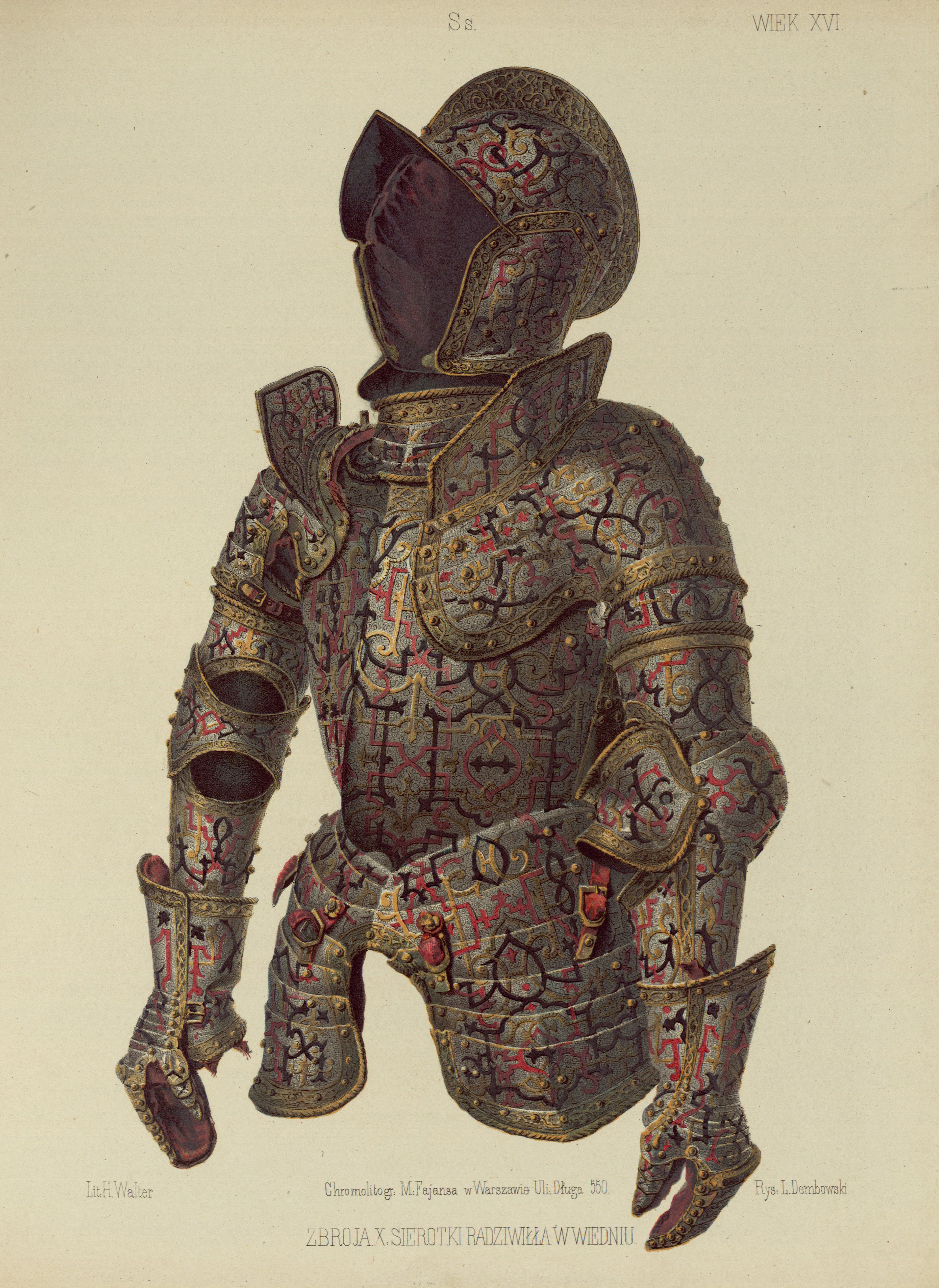 Беларуская (тарашкевіца): Узбраеньне Мікалая Радзівіла «Сіроткі» (Mikałaj Radzivił «Sirotka»)